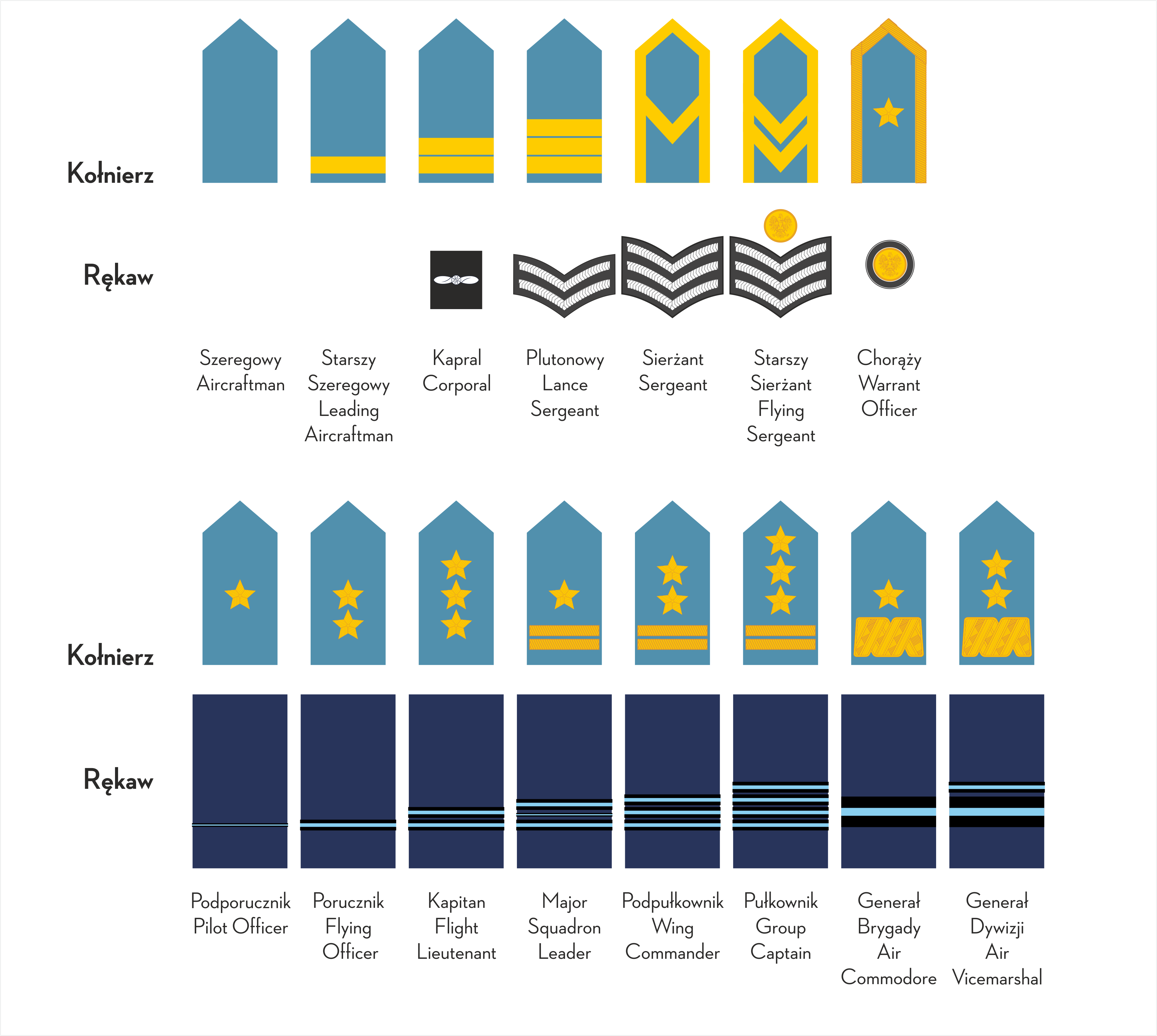 Oznaki stopni Polskich Sił Powietrznych 1940-1945